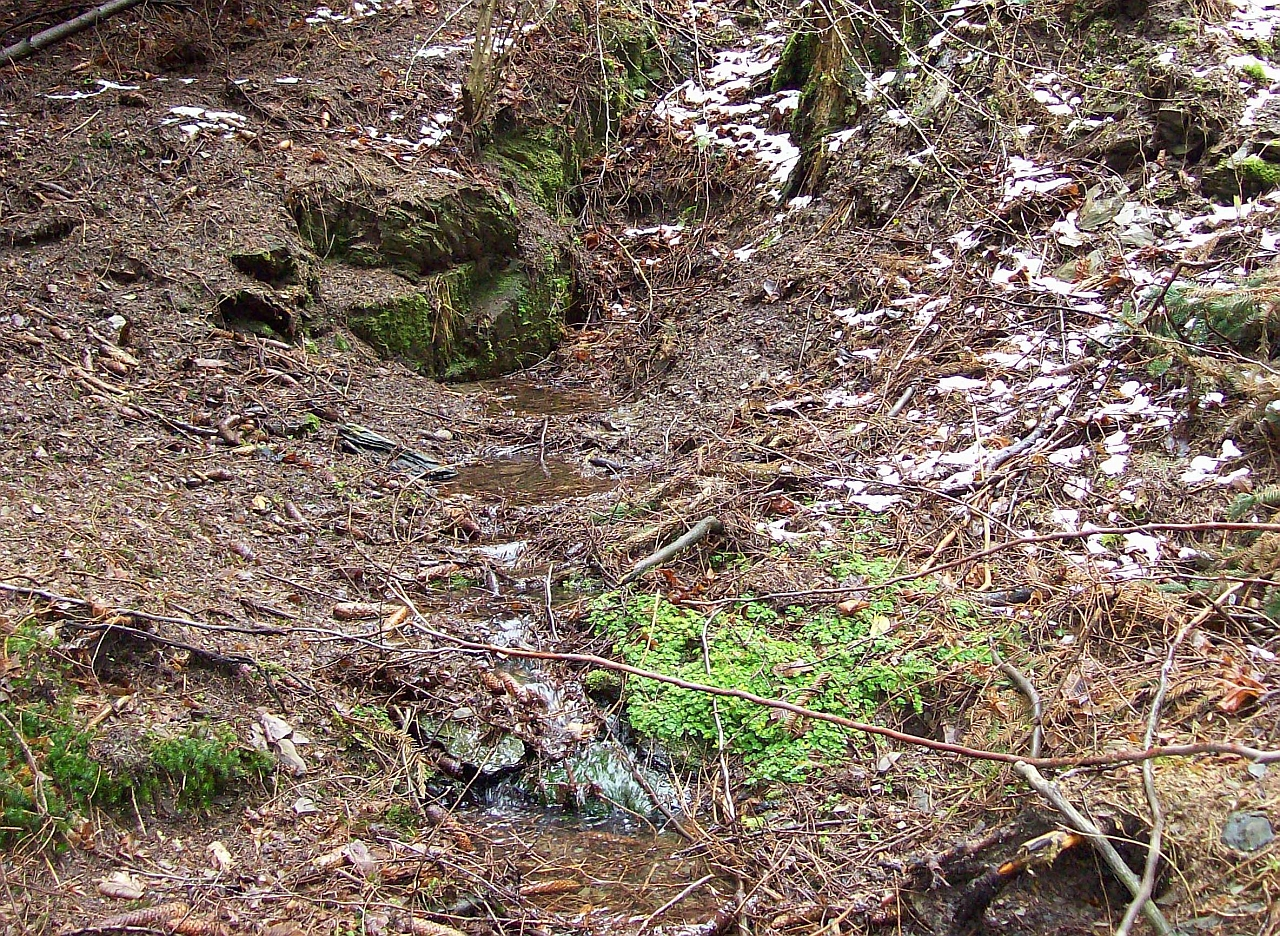 Wennequelle in Schmallenberg (Germany)